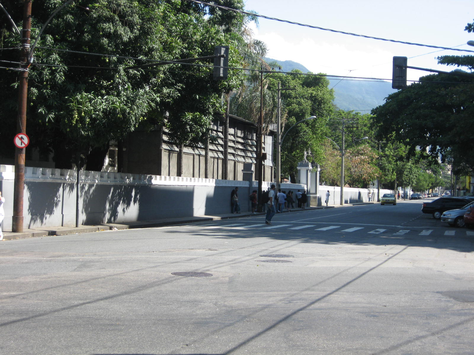 Rua Barão de Mesquita, localizada no Rio de Janeiro.